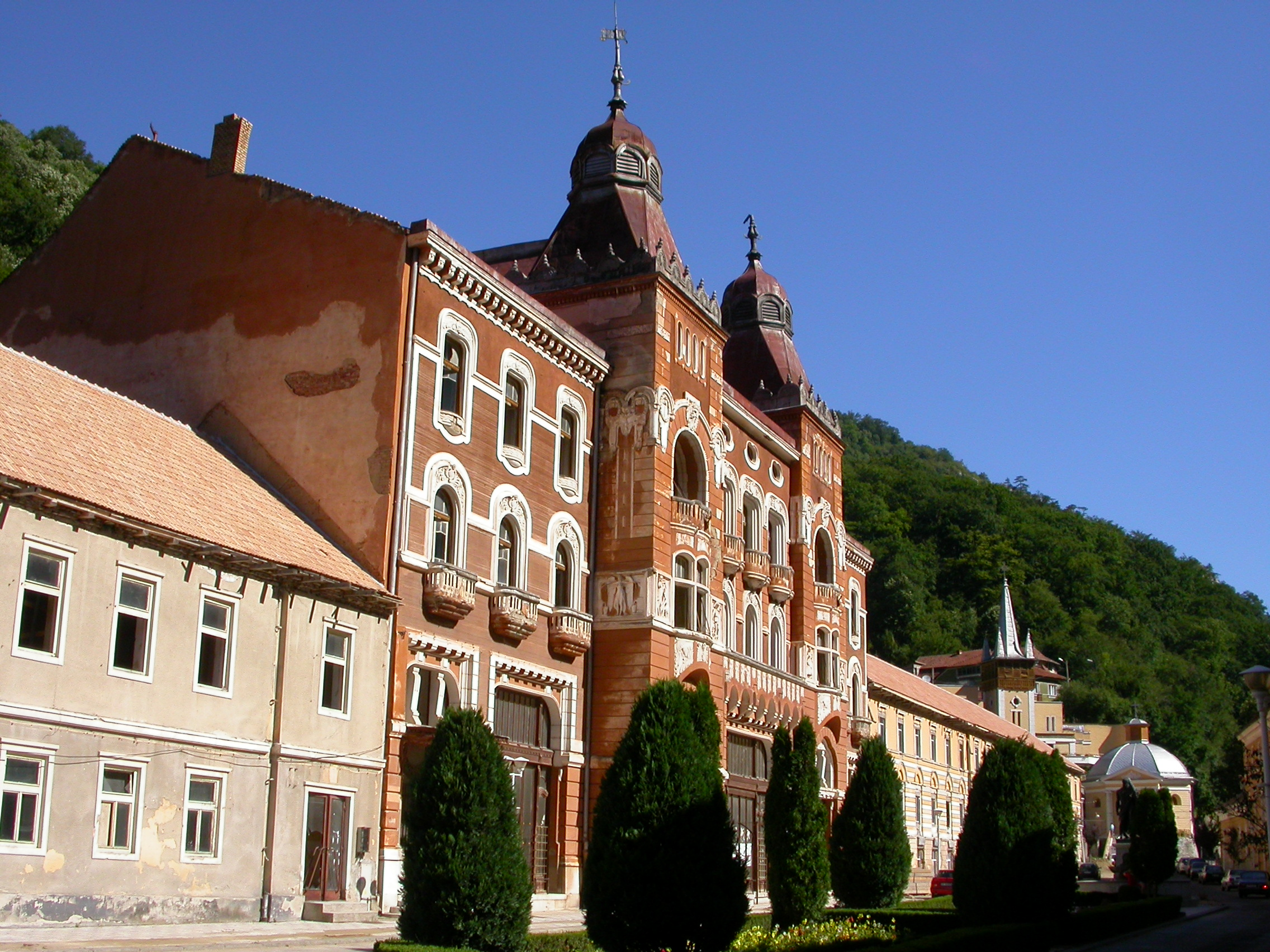 Fosta Ospătăria cea mare, apoi Hotel "Arhiducele Franz Joseph", Pavilionul 6, Hotel "Dacia"